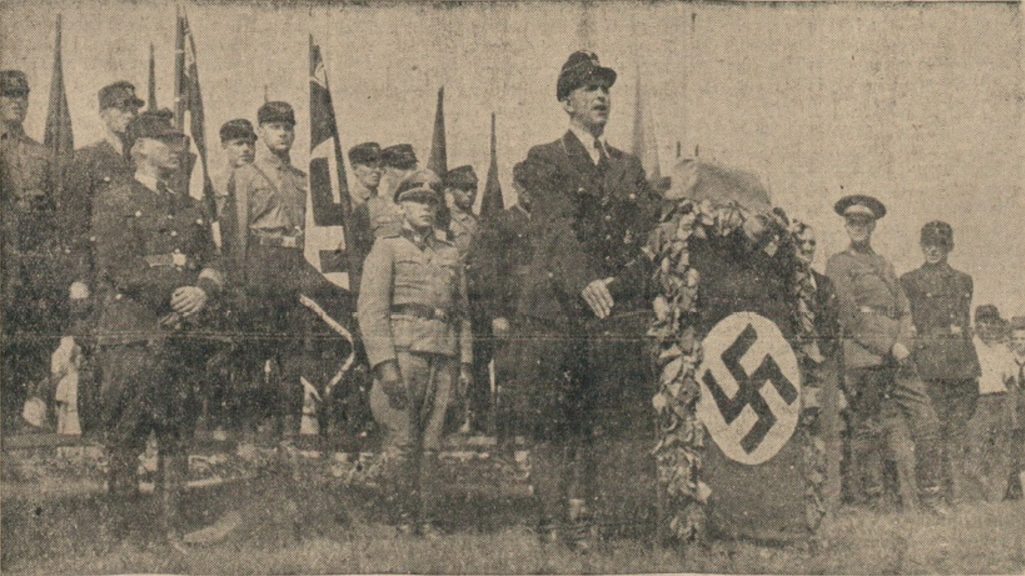 Originaltext: Die NS-Parteigenossen, Andreas Schmidt (Volksgruppenführer) [1912-1948], Viktor Stürmer u.a. verabschieden die ersten 1300 SS-Freiwilligen des Kreises Prinz-Eugen.